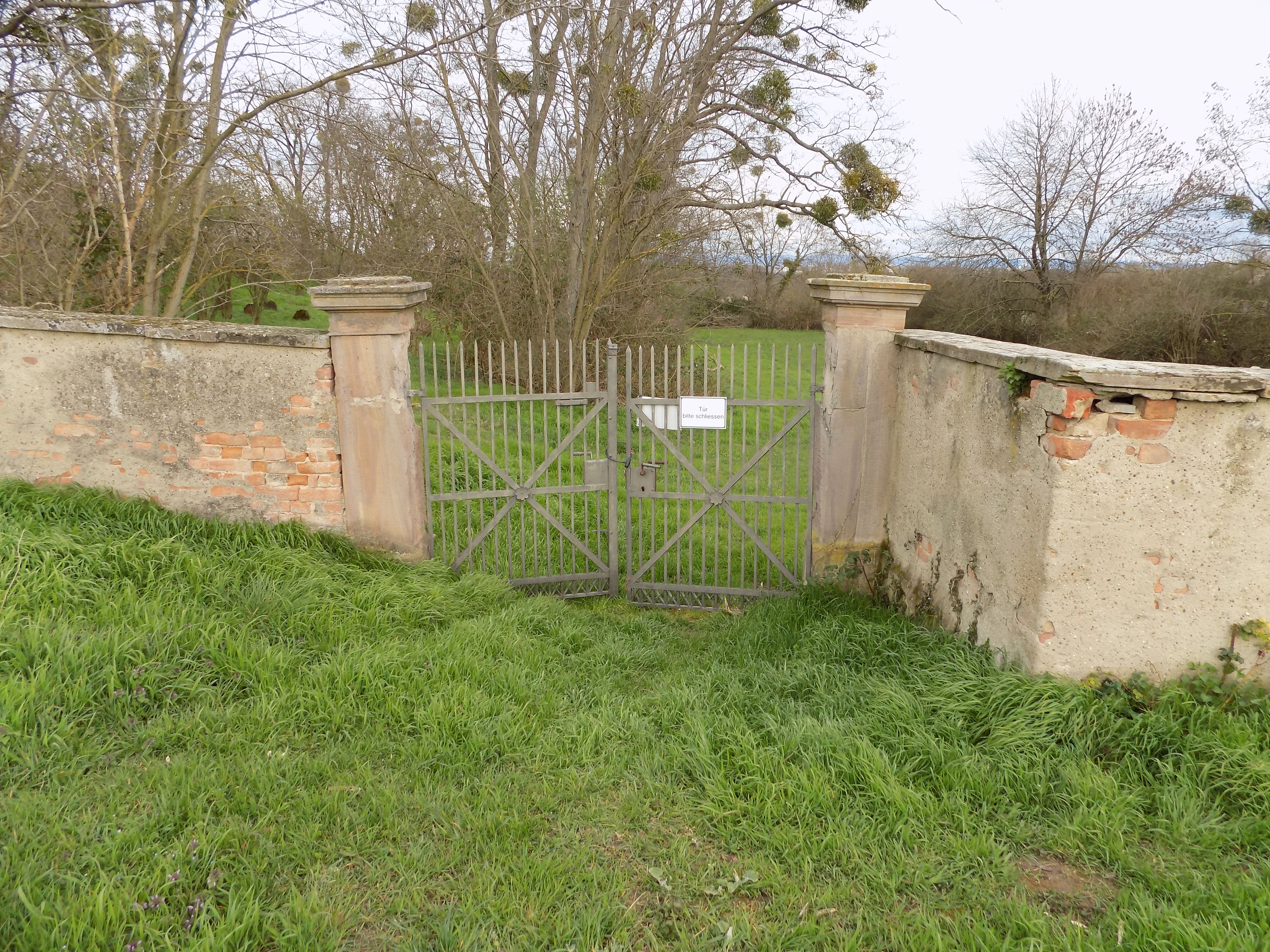 Eingang Jüdischer Friedhof Worms-Herrnsheim